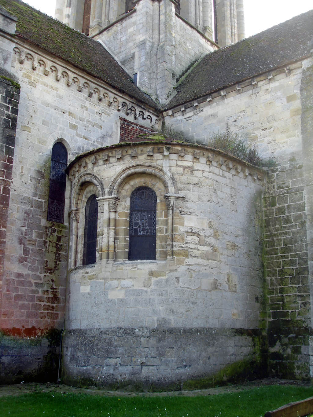 Vue extérieure de la chapelle (XI-XIIe siècle) de l'église à Auvers-sur-Oise (Val-d'Oise), France